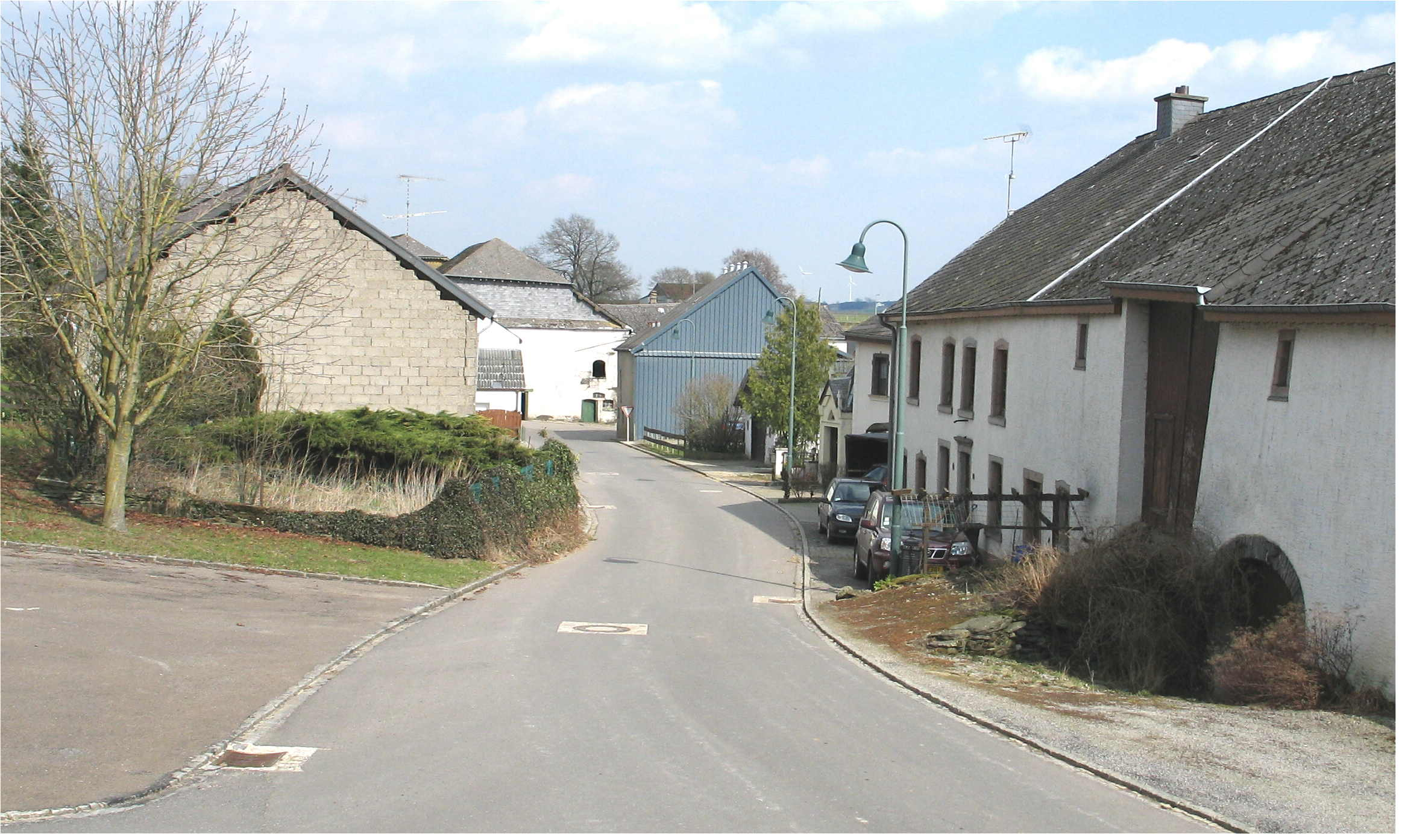 Strooss bei der Kierch vun Tratten.